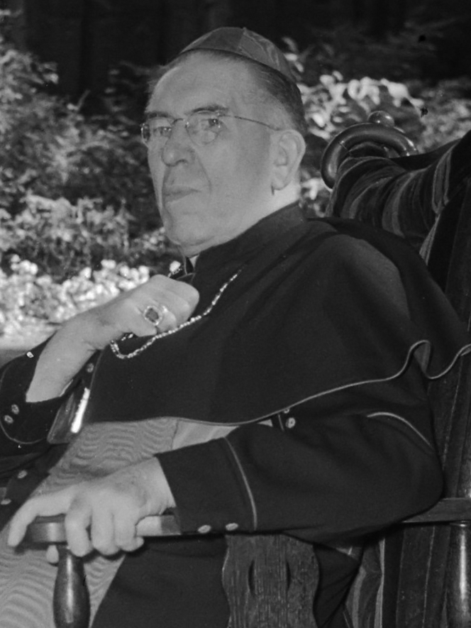 Kardinaal J. de Jong 45 jaar priester 14 augustus 1953